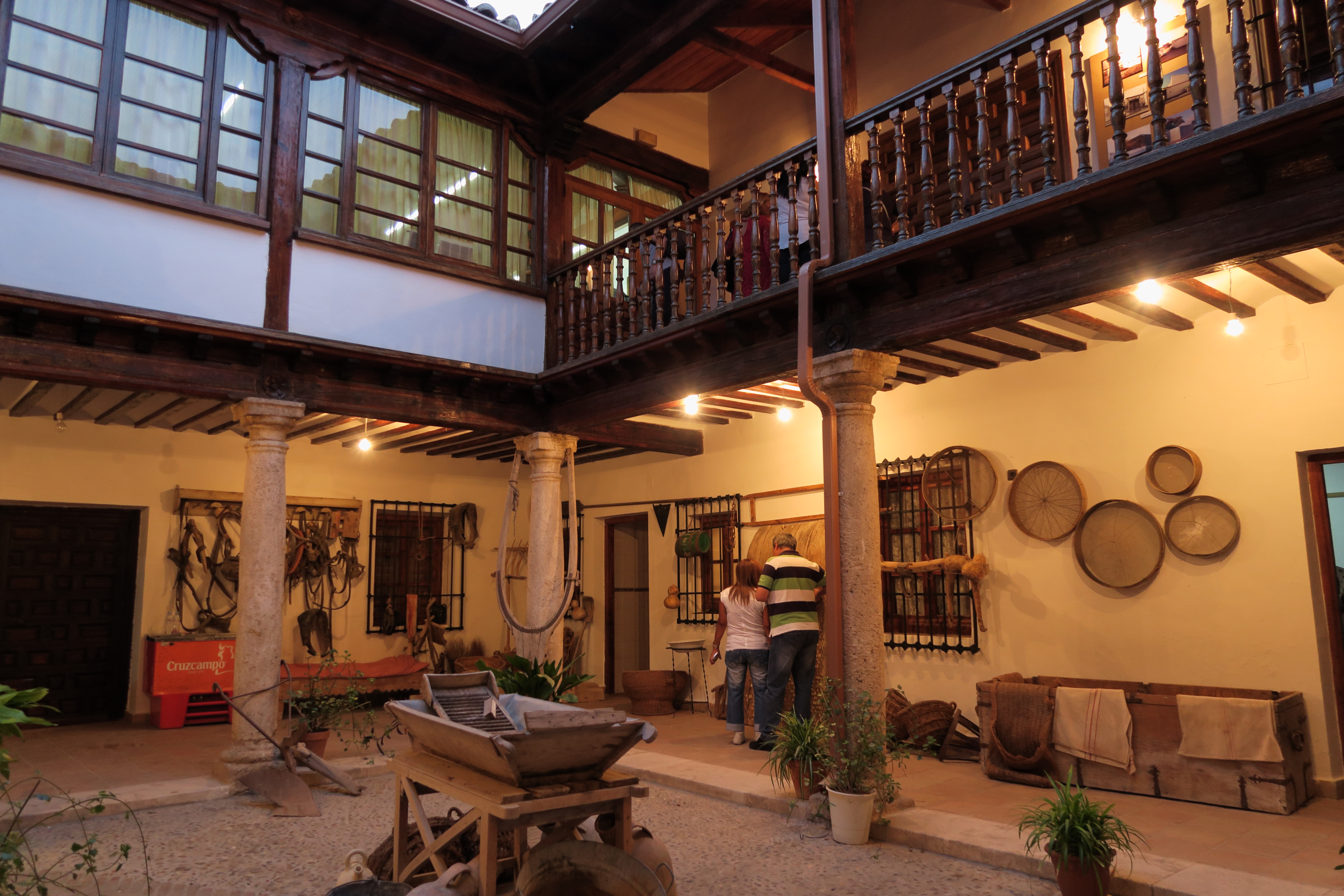 Casa de los Jaenes, La Guardia, Toledo